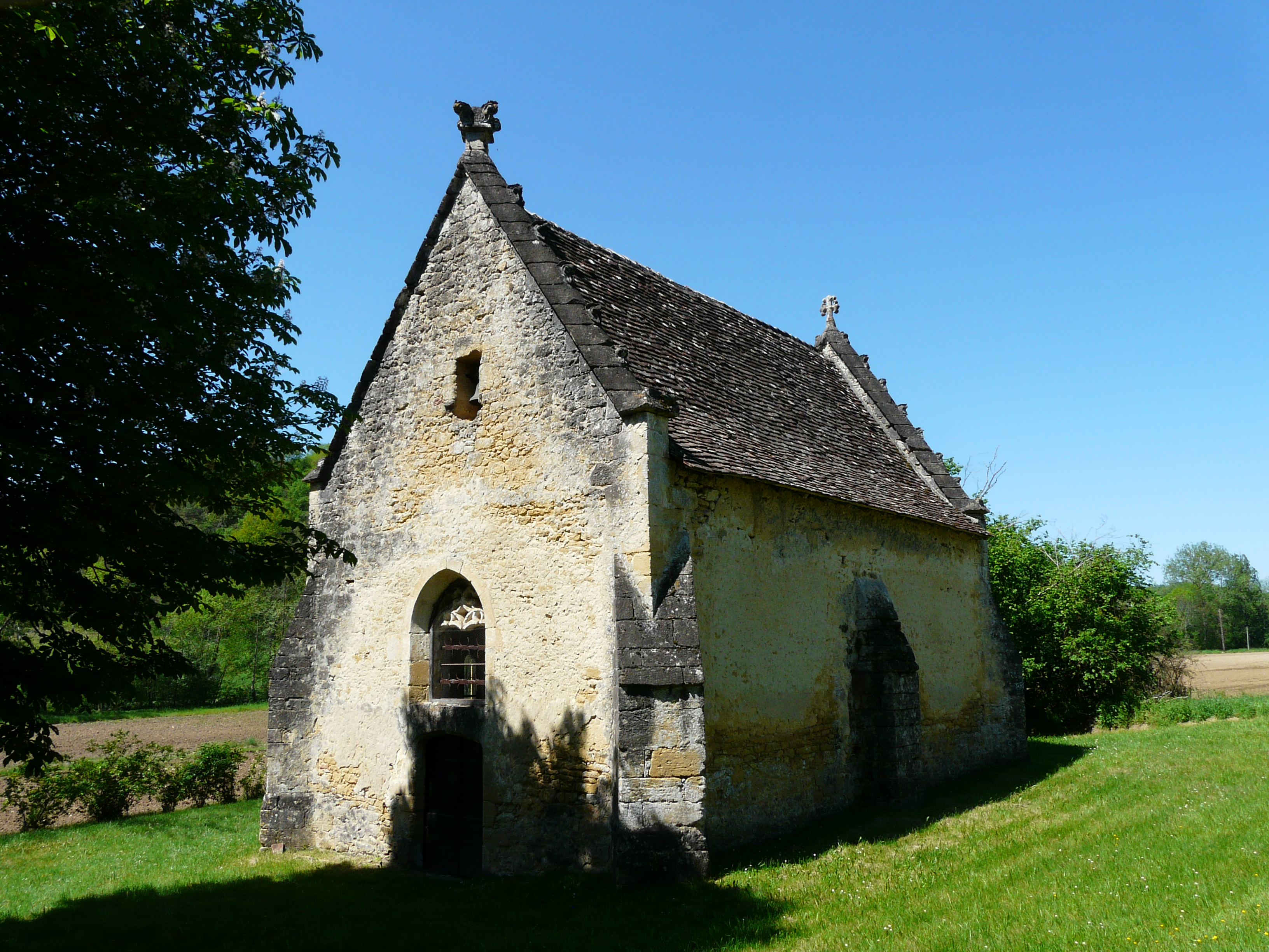 La chapelle Saint-Rémy, Auriac-du-Périgord, Dordogne, France.